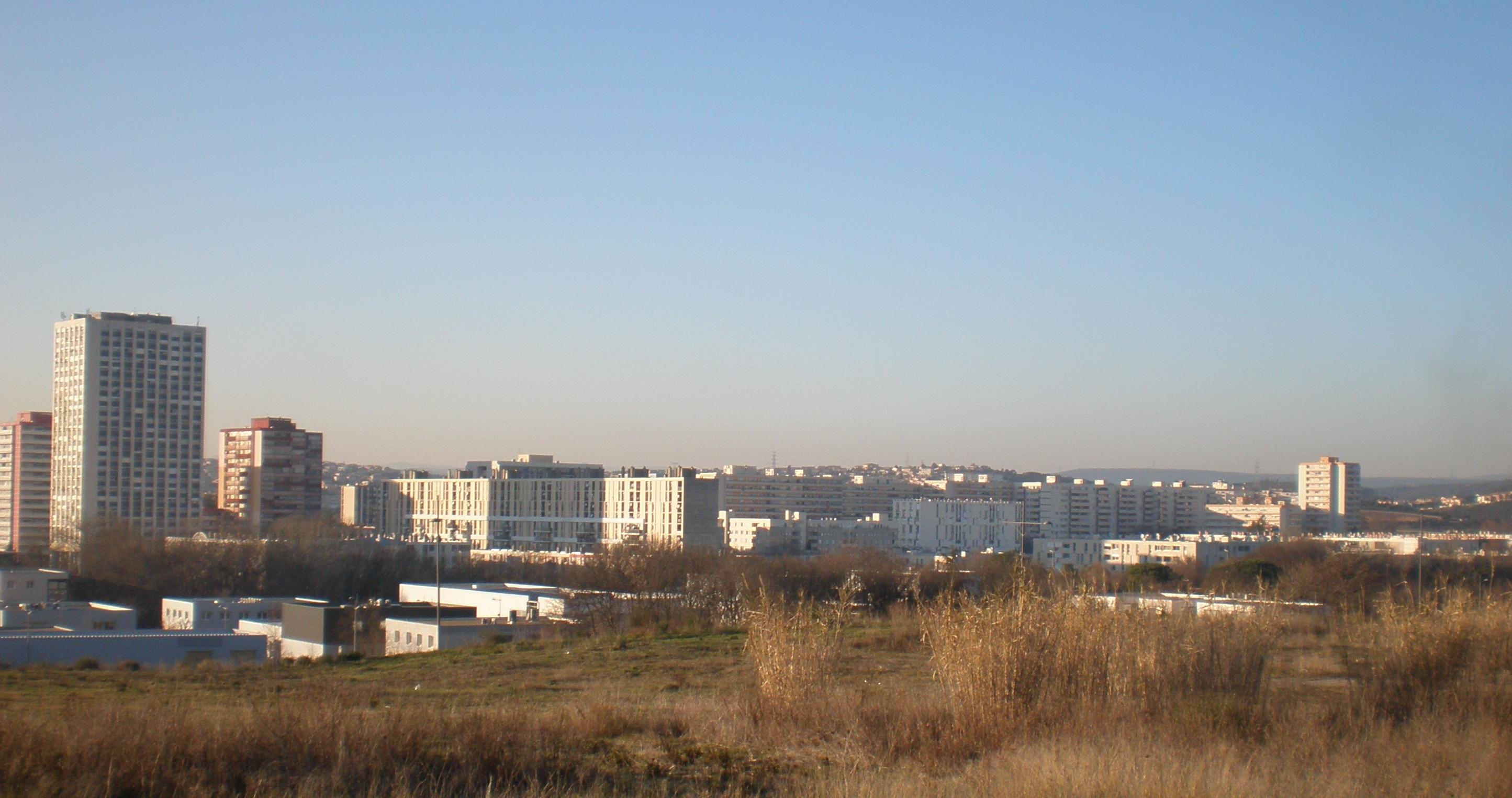 Vue d'ensemble du quartier de la Paillade à Montpellier